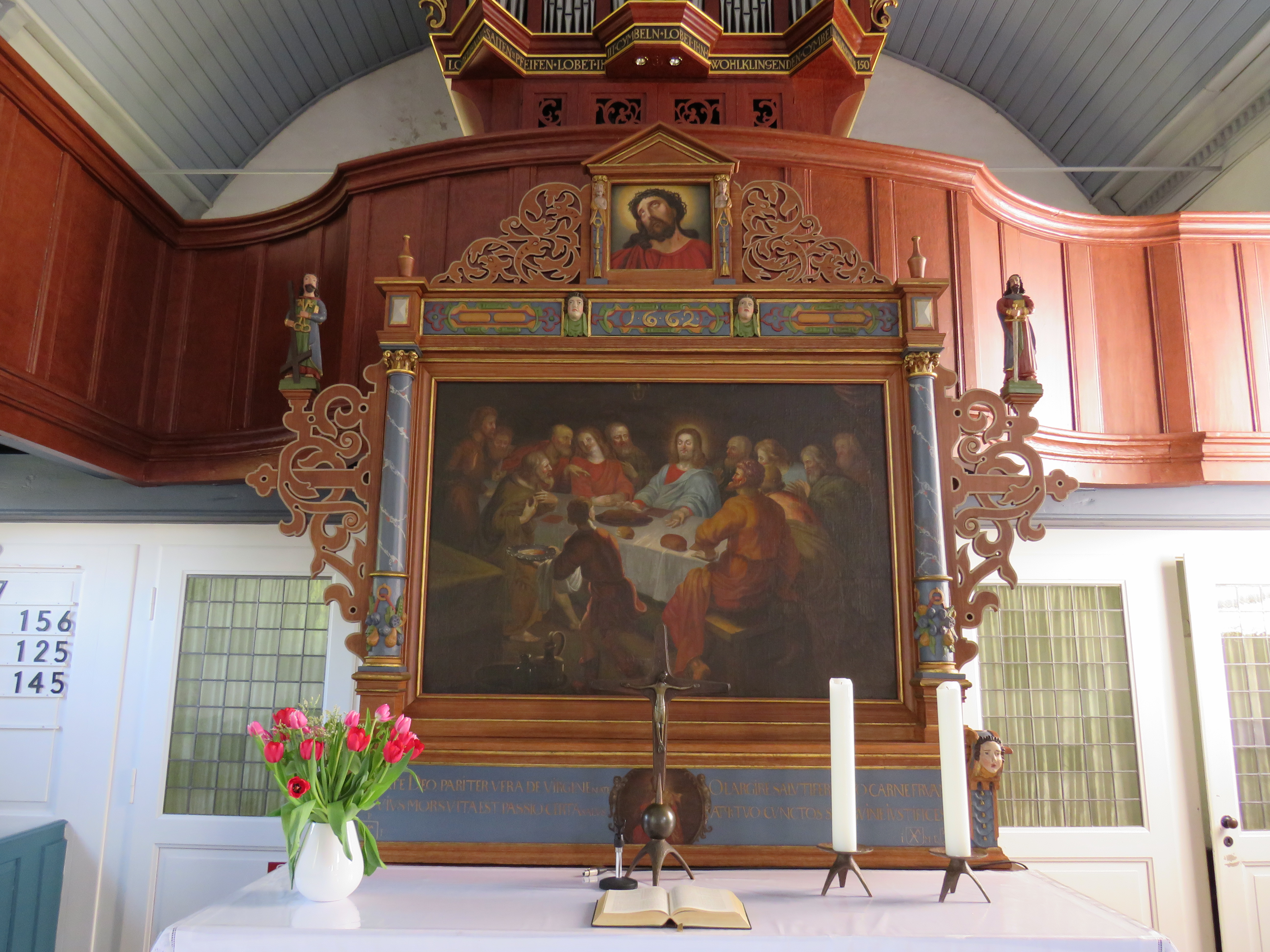 Liudgerikirche Hesel Altar